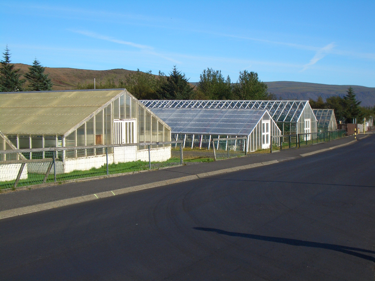 Photo taken by Showiki, September 2006.